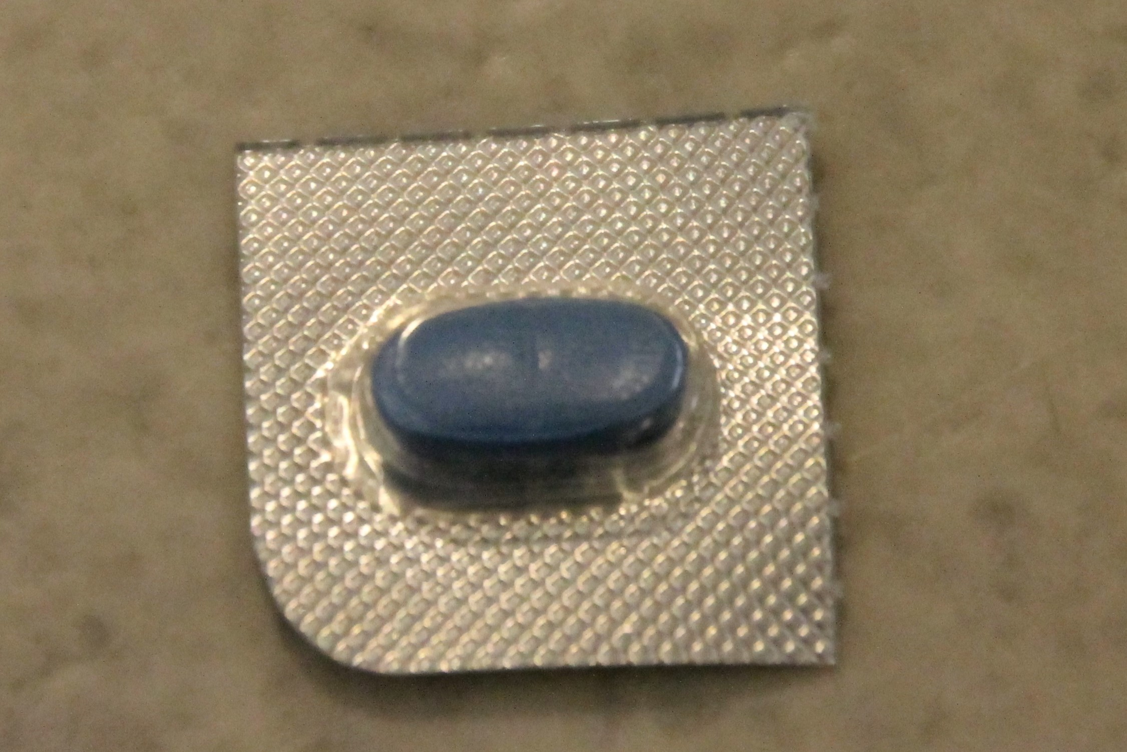 Dormicum (midatsolaami) 15mg -tabletti.